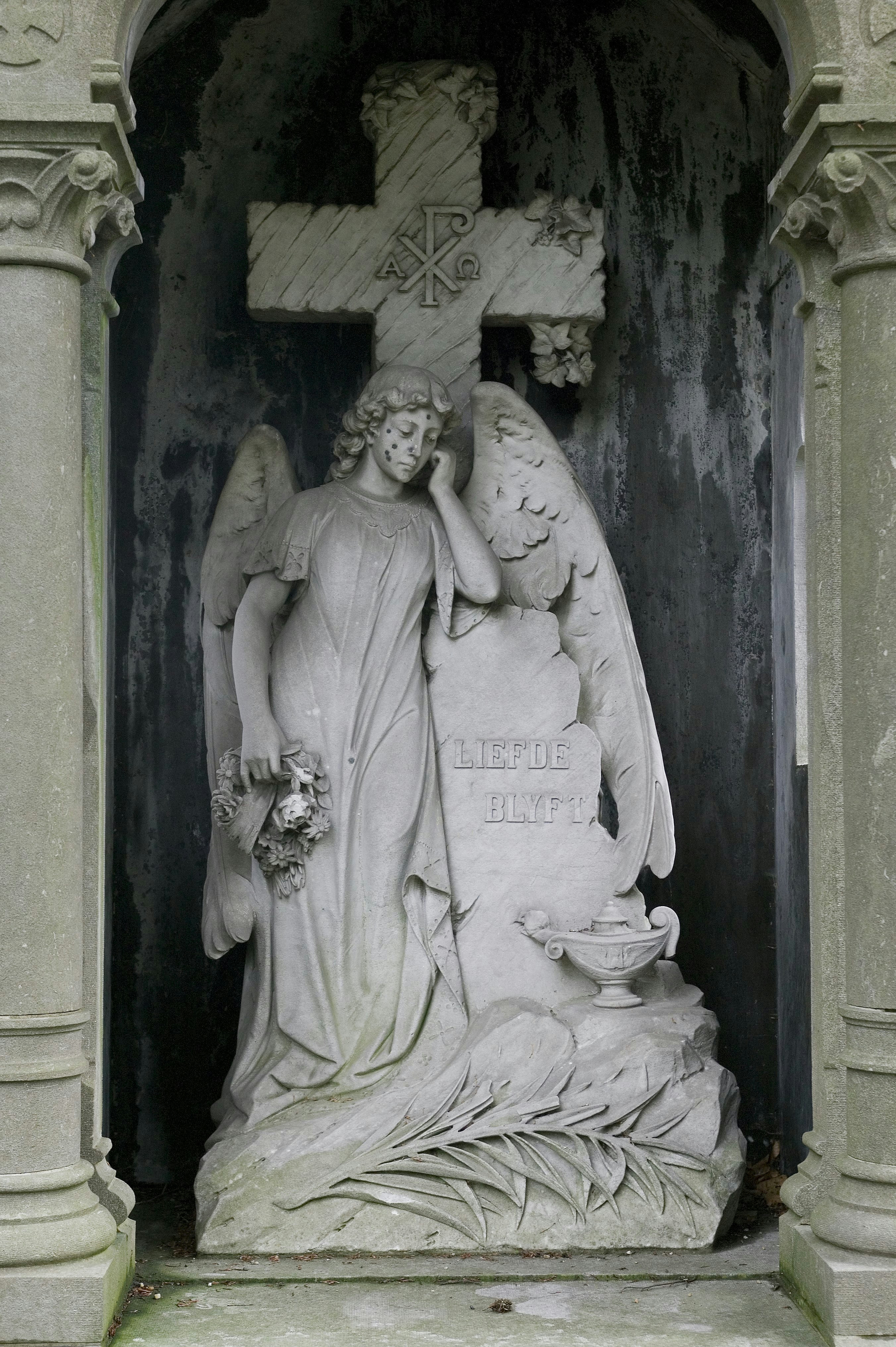 Van Rosendael: Detail van het grafmonument (familiegraf) van Carel van Rosendael met treurende engel (opmerking: Deze foto is een onderdeel van fotoreportage over begraafplaatsen waarbij symboliek, gebruiken en verschillende onderdelen werden vastgelegd. Opnamen zijn gemaakt op diverse begraafplaatsen.)